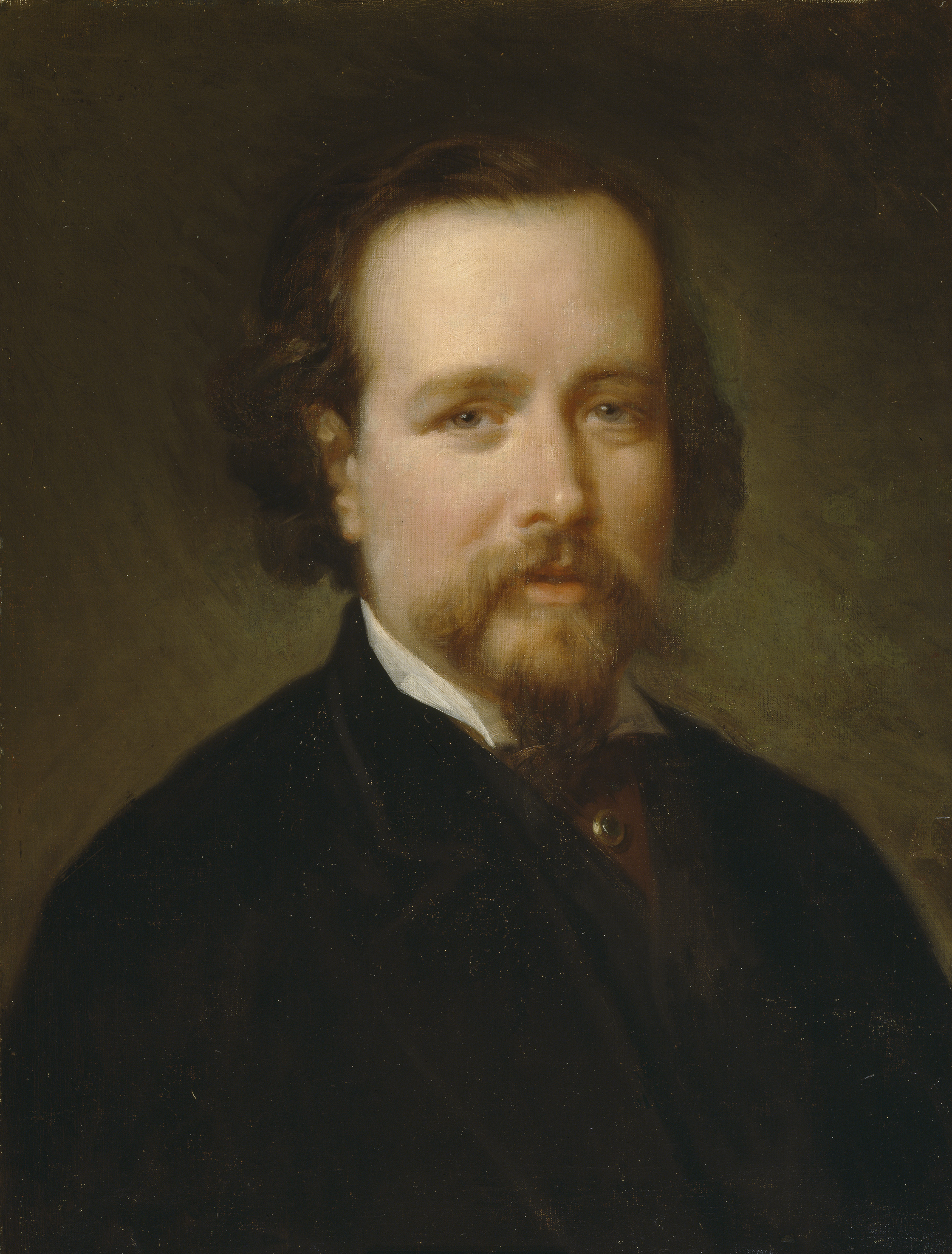 Retrato del pintor español Vicente Palmaroli (1834-1896).